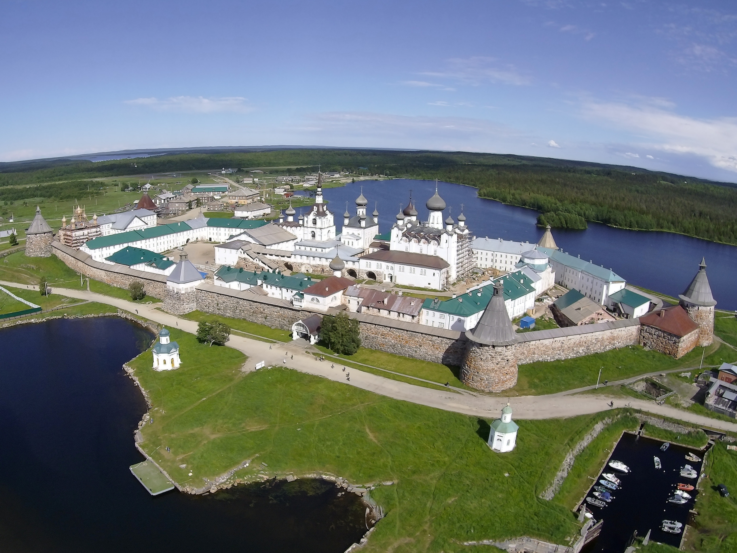 Letecký snímek Soloveckého kláštera